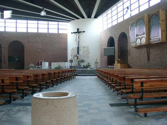 Gliwice - os. Sikornik, kościół p.w. NMP Matki Kościoła. Zdjęcie wykonano 12 VI 2005 r. Autor: Wikipin